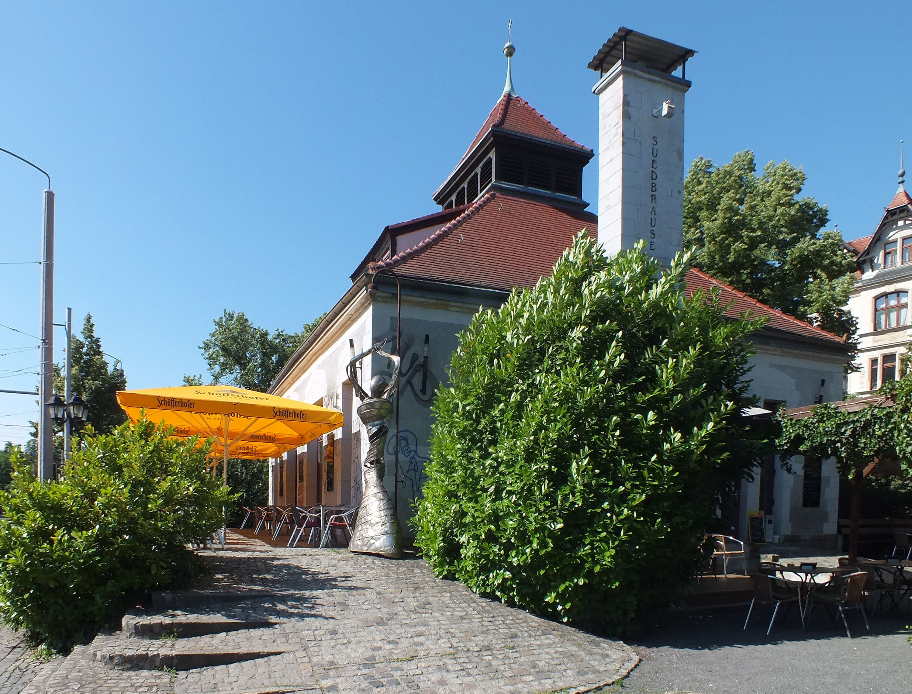 Restaurant Südbrause in Leipzig-Connewitz mit seinen beiden Freisitzflächen